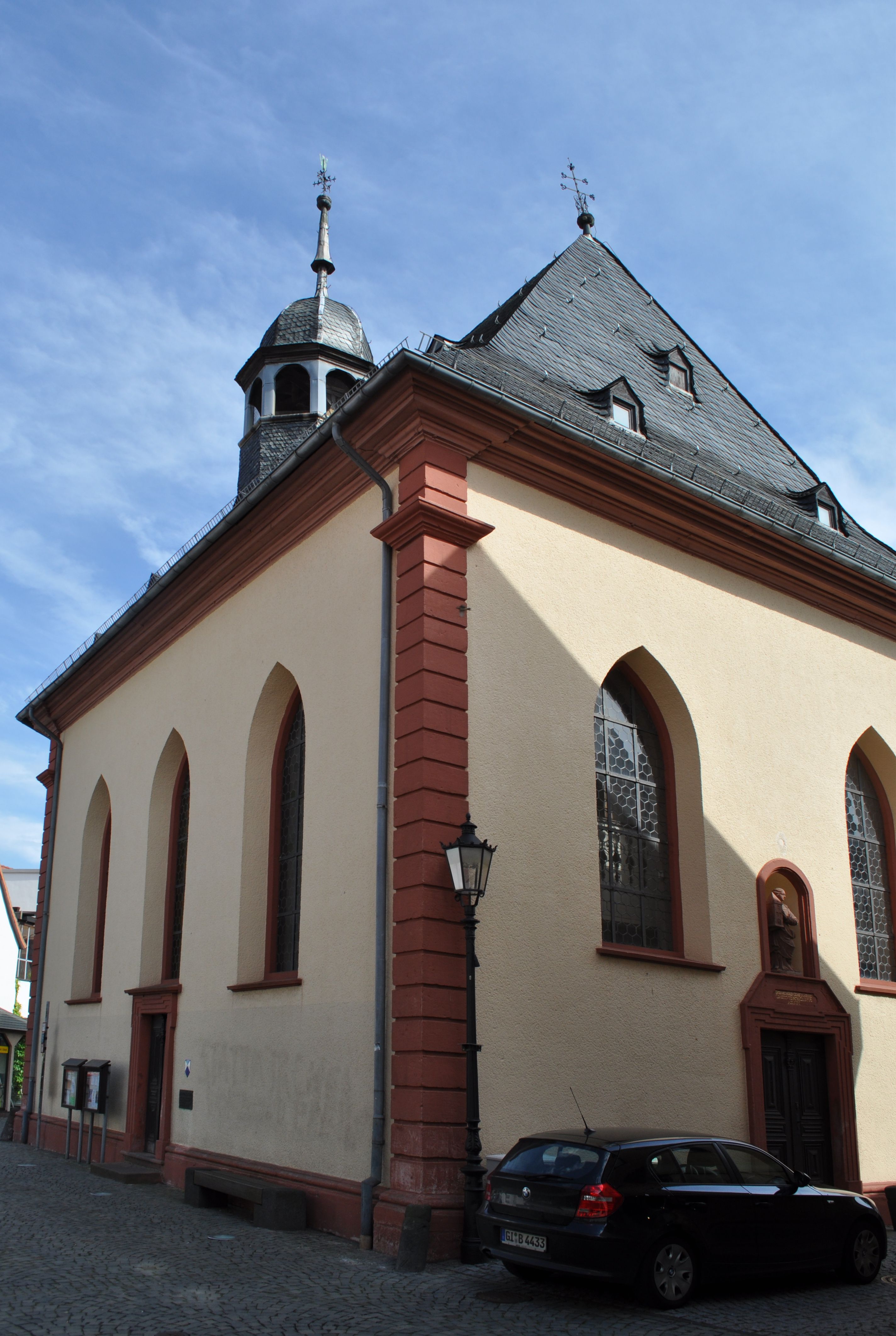 Oberursel, Hospitalkirche